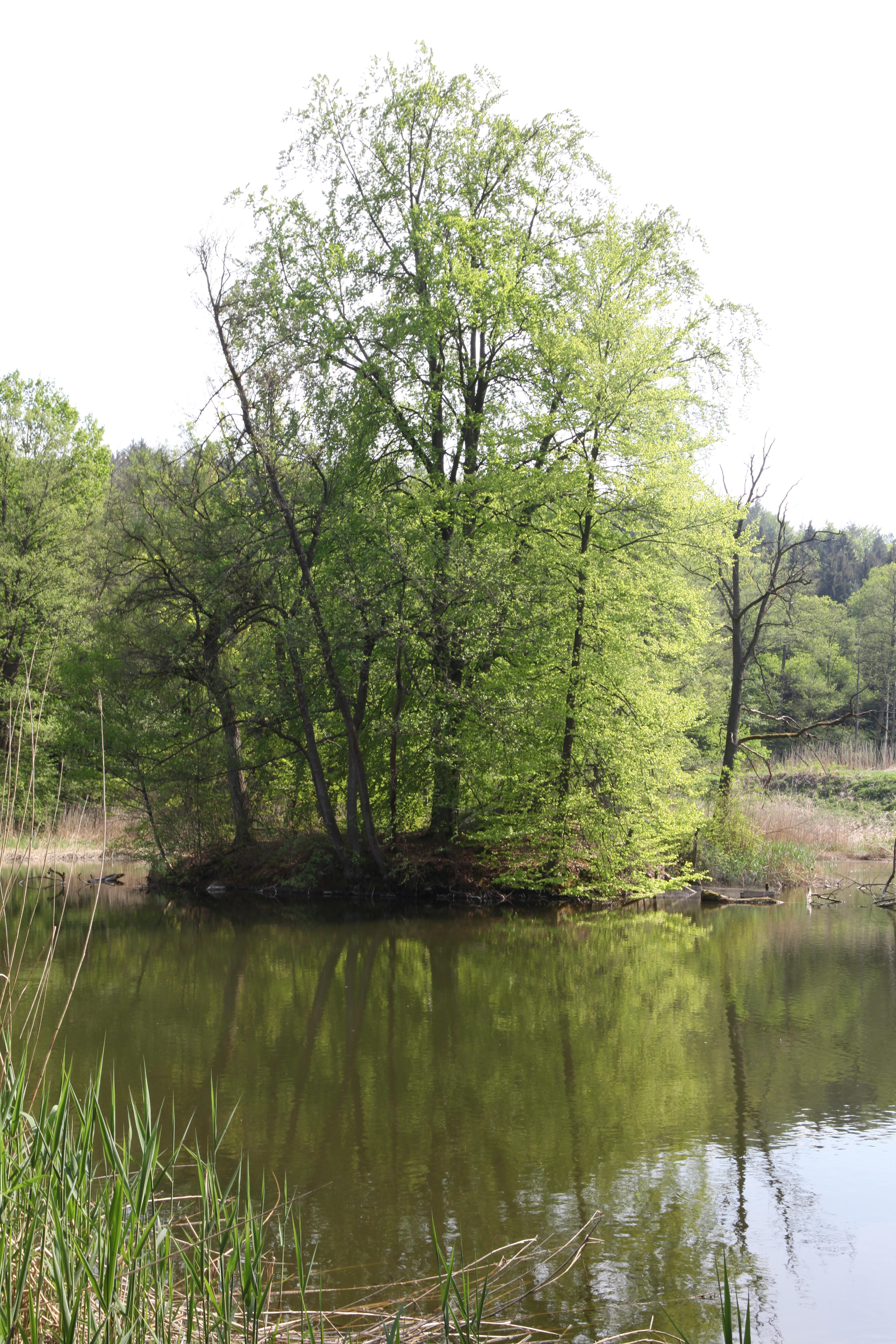 Turmhügel des hohen und späten Mittelalters im Inselteich im Park des Schlosses Callenberg